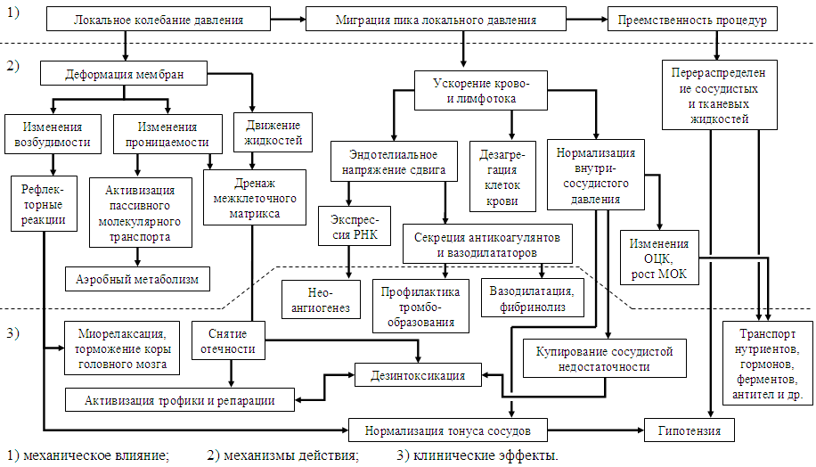 Механізм специфічної дії об'ємного пневмопресингу (Д.В. Зайцев, Л.А. Карамзіна, 2015)